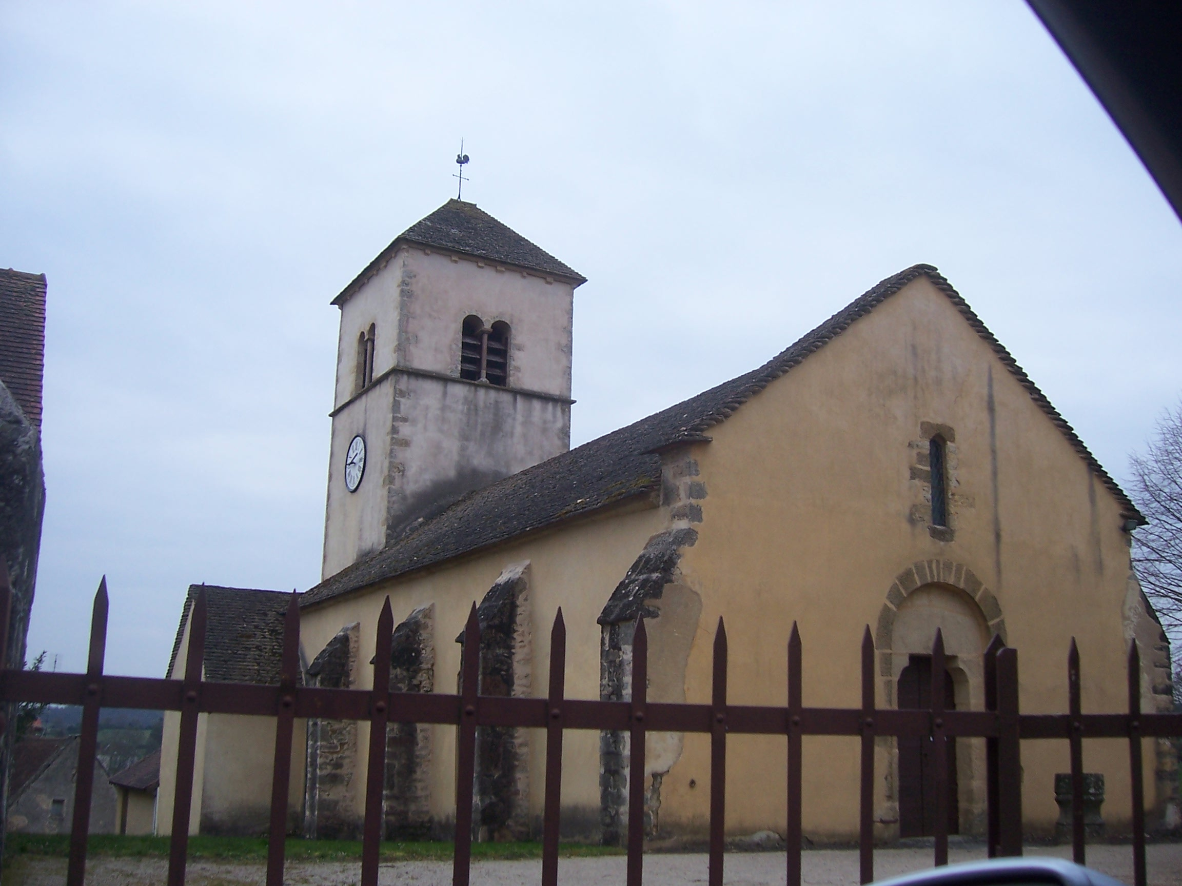 Eglise de Curtil-sous-Burnand